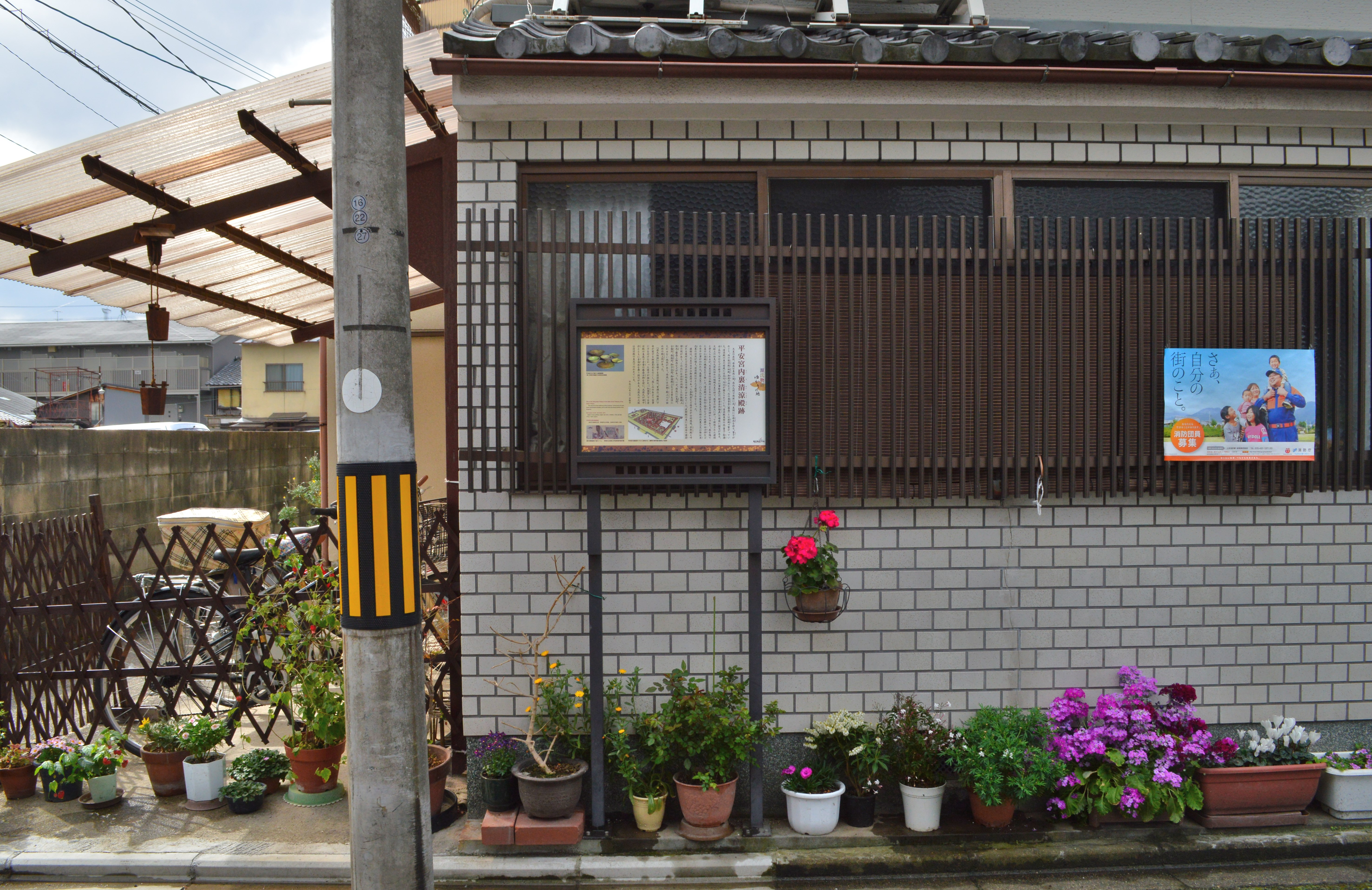 平安京大内裏 清涼殿跡 説明板